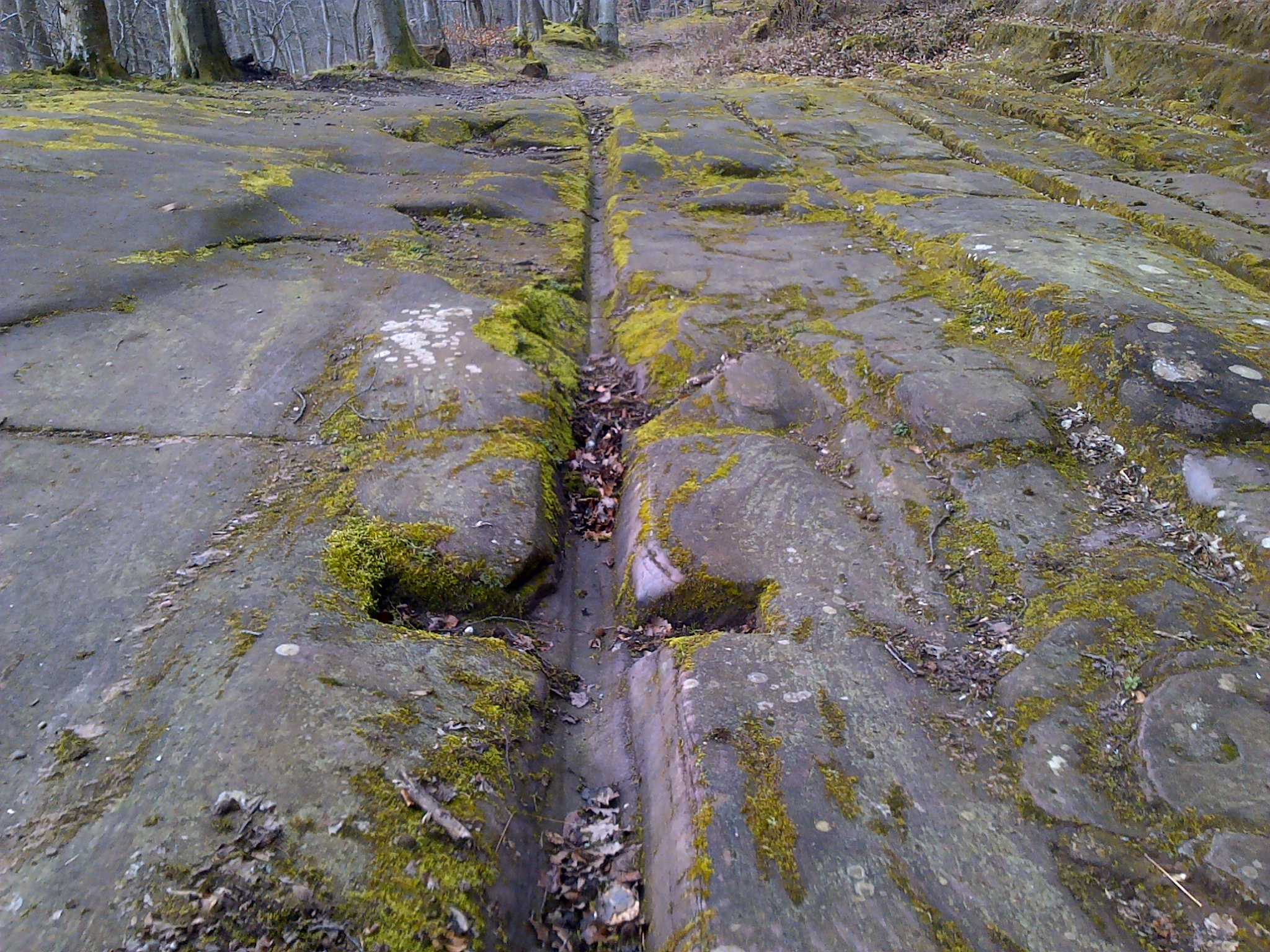 Col de Saverne - Randonnée Club Vosgien